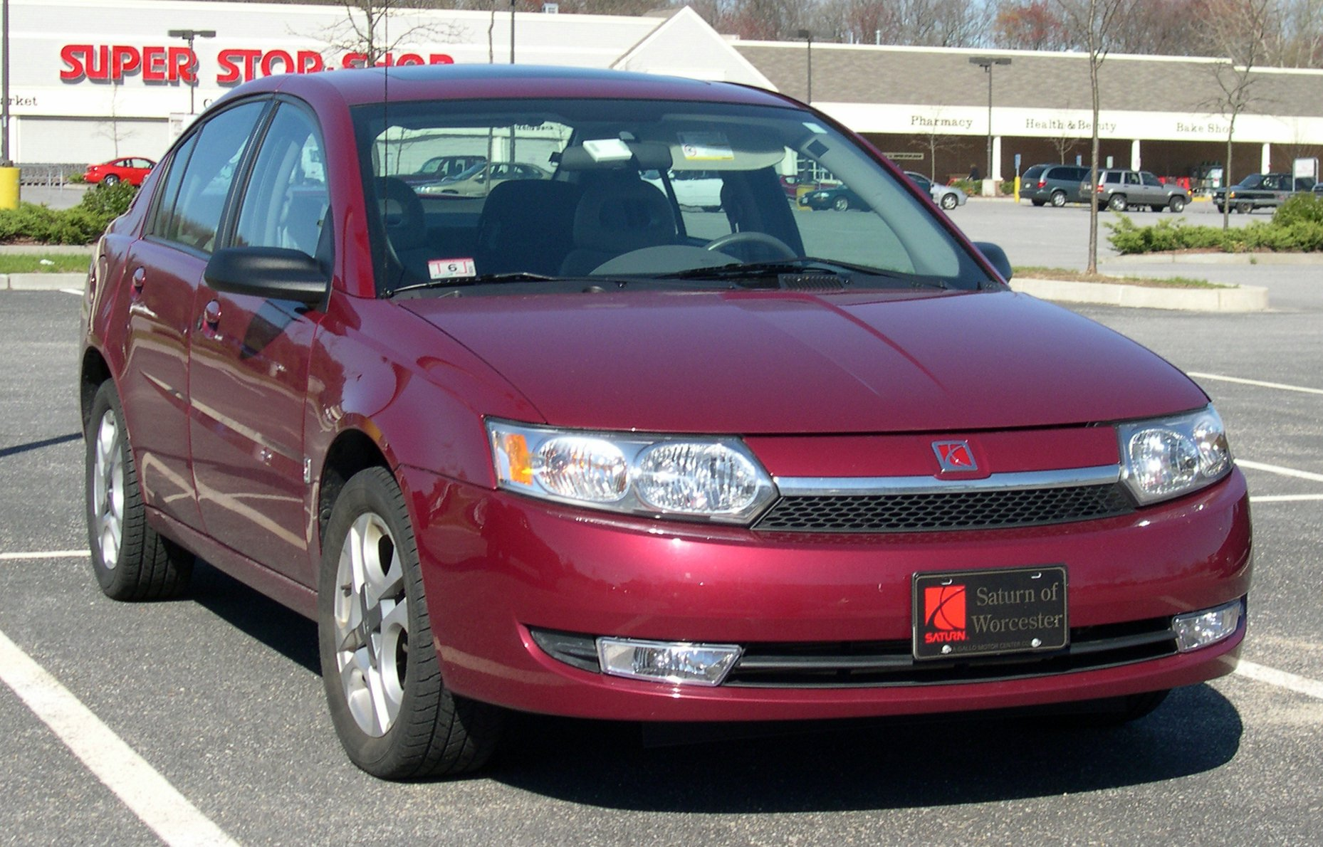 Saturn Ion sedan